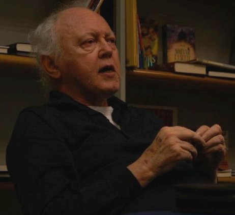 Foto di Alessandro Monchietto; scattata il 22 aprile 2010 durante la presentazione del Libro "Bentornato Marx!" di D.Fusaro alla libreria Comunardi di Torino